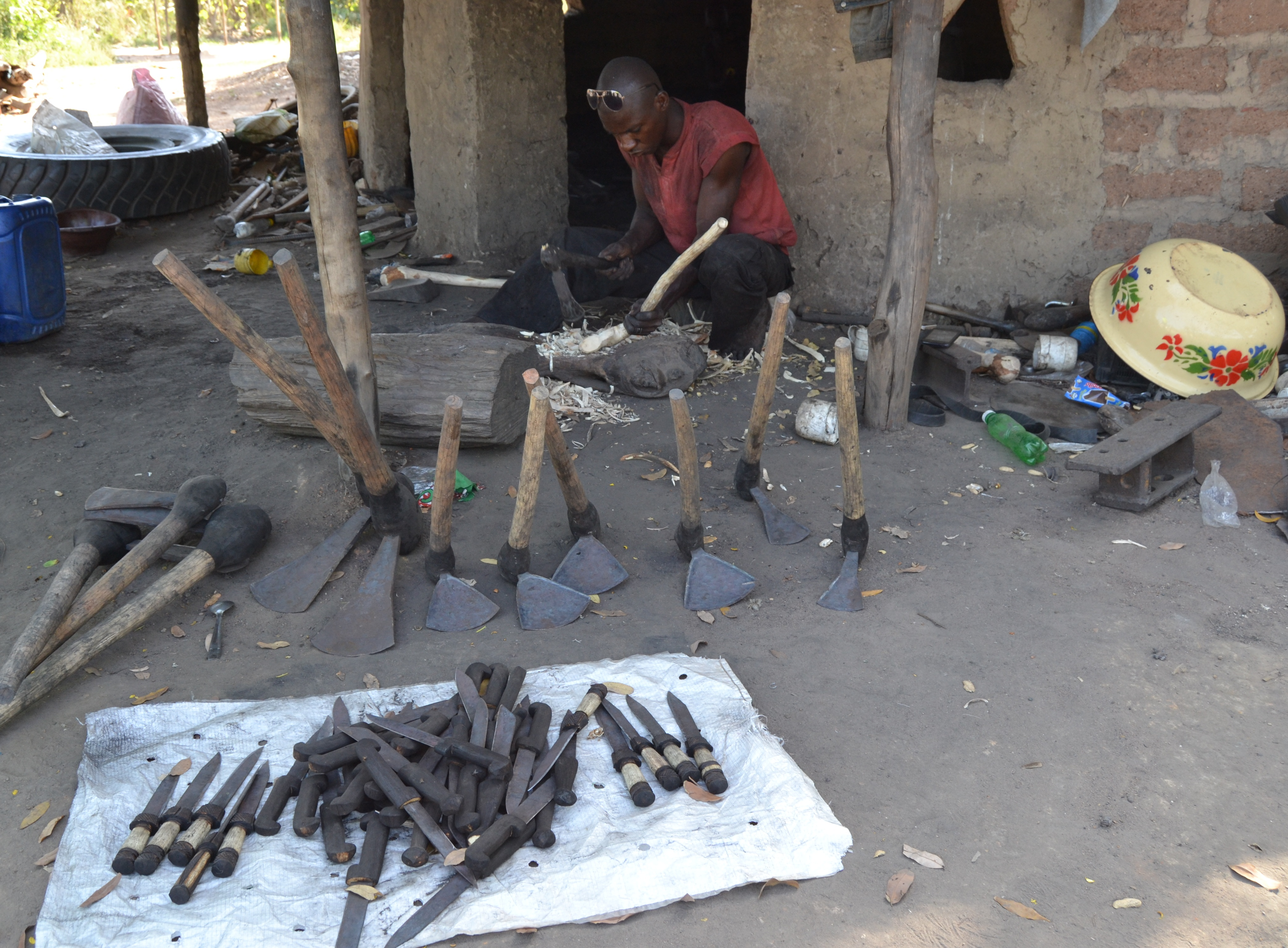 Un forgeron en activité, dans son atelier, à Ferké, une ville située au nord de la Côte d'Ivoire, à environ 600 km d'Abidjan, la capitale économique ivoirienne. Il fabrique des dabas, des couteaux... This is an image of "African people at work" from Ivory Coast